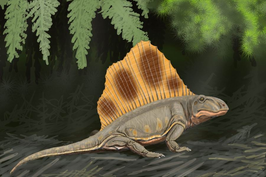 Dimetrodon_loomisi, autor - Bogdanov,2006